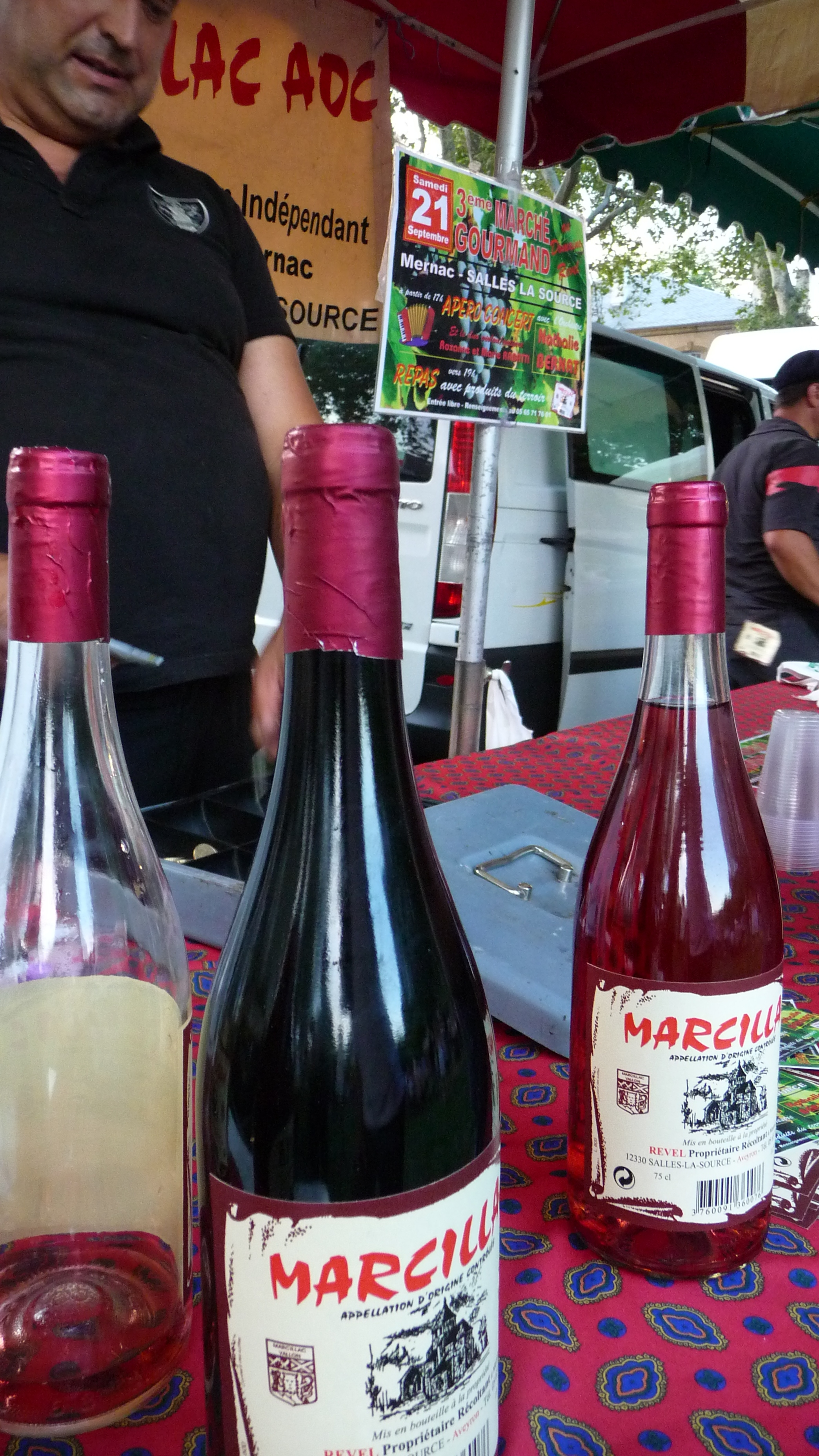 Jean-Marie REVEL paysan vigneron-éleveur ovin derrière son étal sur lequel sont proposés à la consommation ses vins de Marcillac rosé et rouge. Marché d'agriculteurs producteurs du groupement "Fermiers De L'Aveyron"